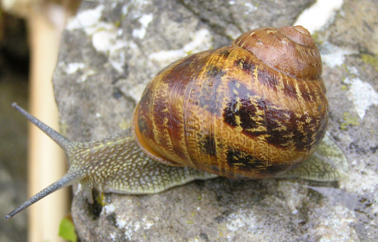 Lumache da gastronomia